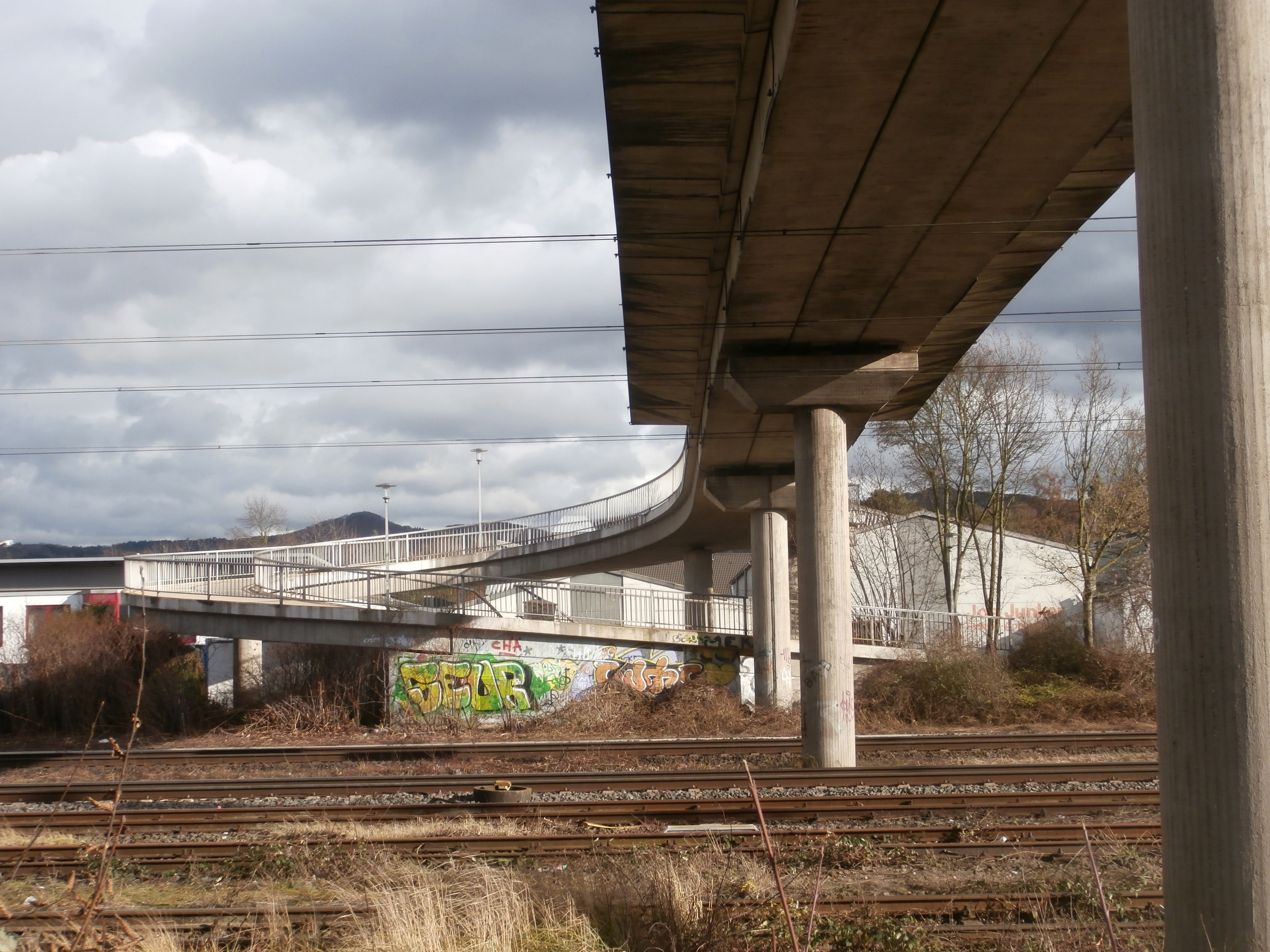 Fußgängerüberführung Lohfelder Straße/August-Lepper-Straße, Bad Honnef: Ansicht vom Rand der Bahnstrecke